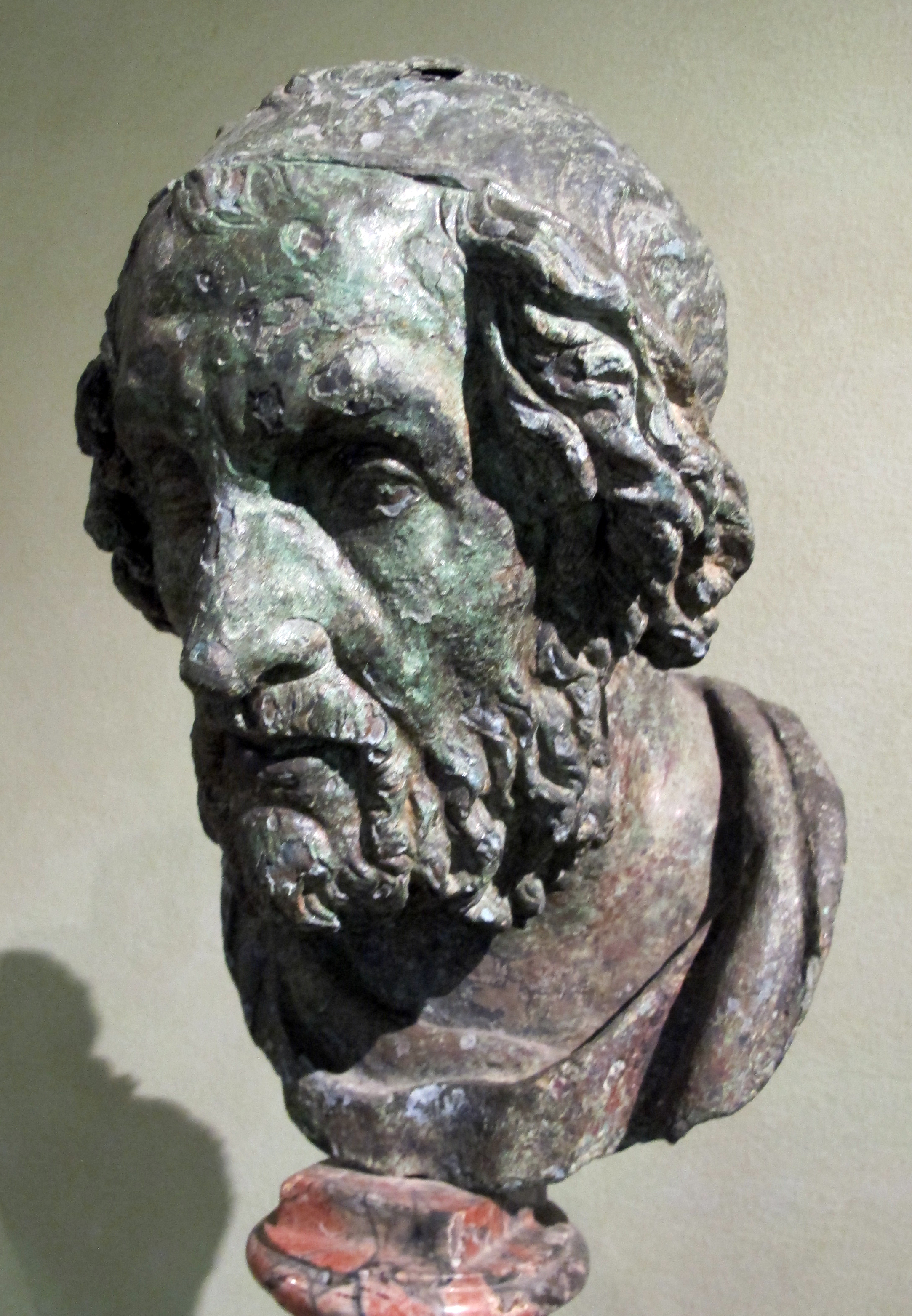 Museo archeologico nazionale (Firenze)